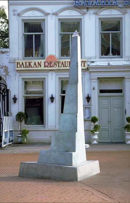 De bekoring, de wijsheid en het gevaar - 1995 Materiaal: brons, acrylaat, QL-verlichting, beton - 350 x 117 x 105 cm. Locatie: Stratumseind, Eindhoven Opdrachtgevers: Gemeente Eindhoven en Heijmans